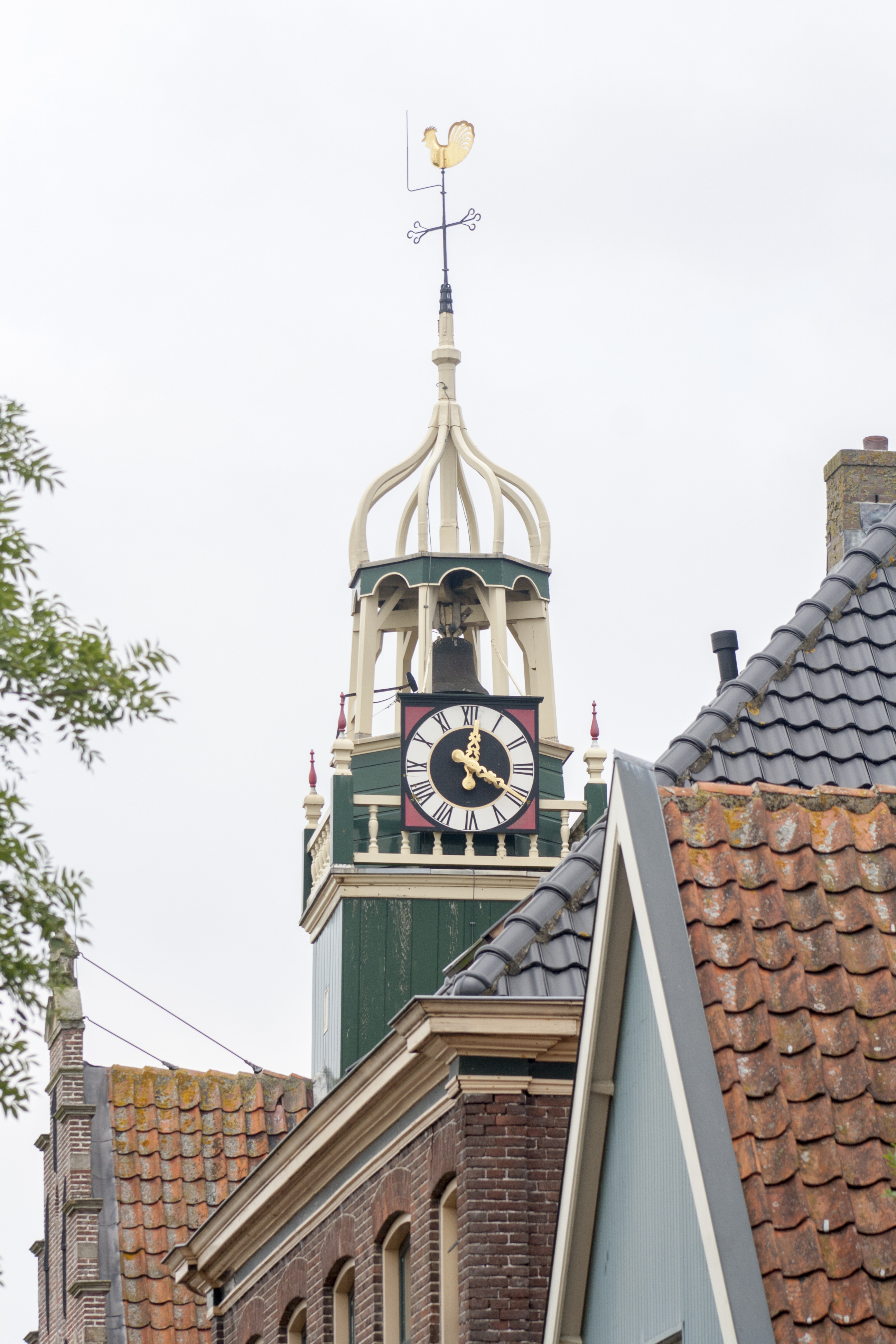 Aanzicht toren Raadhuis van Barsingerhorn